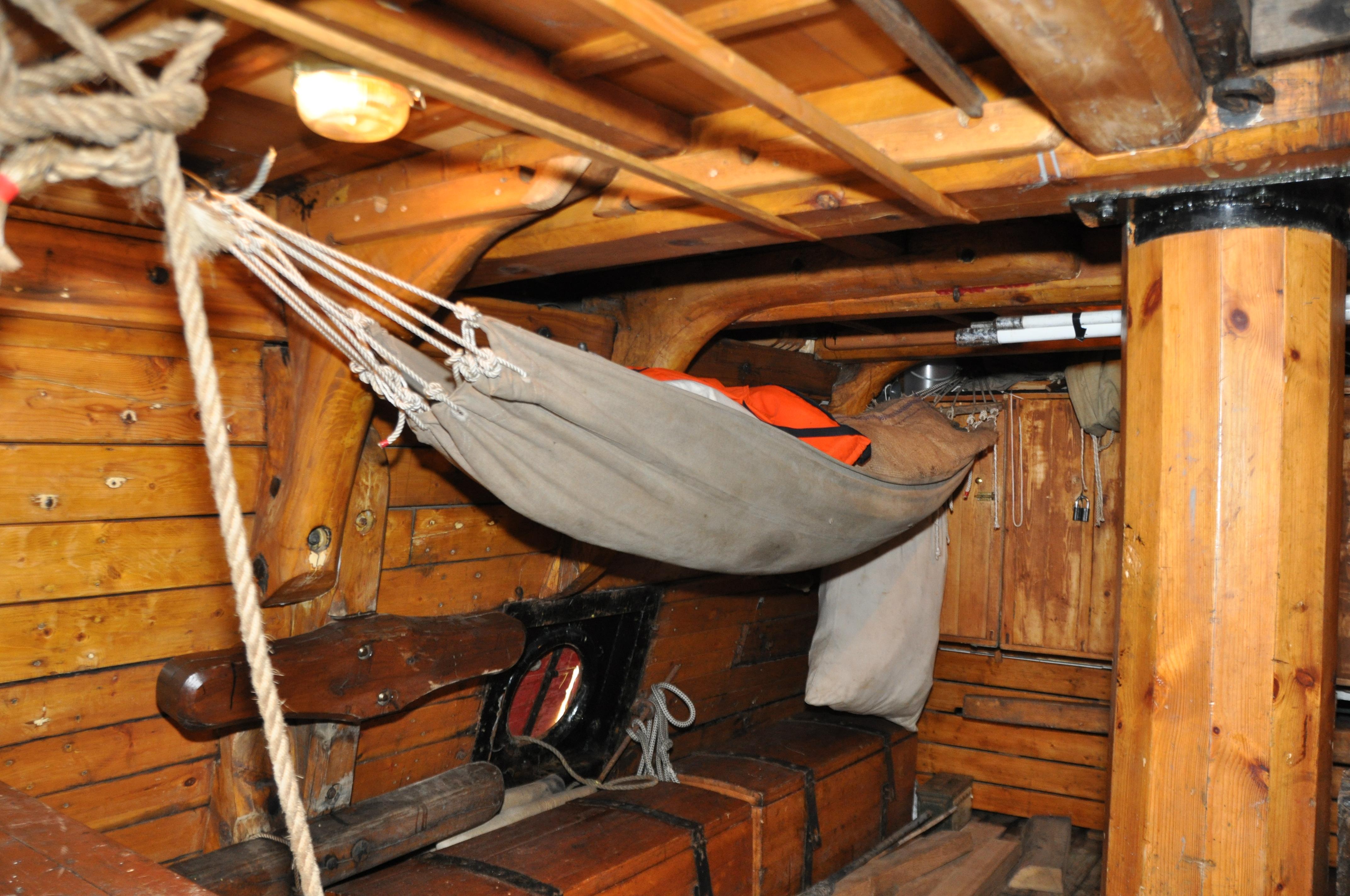 Een hangmat aan boord van de SHTANDART op de Klassieke Schepenbeurs 2010 in Enkhuizen.